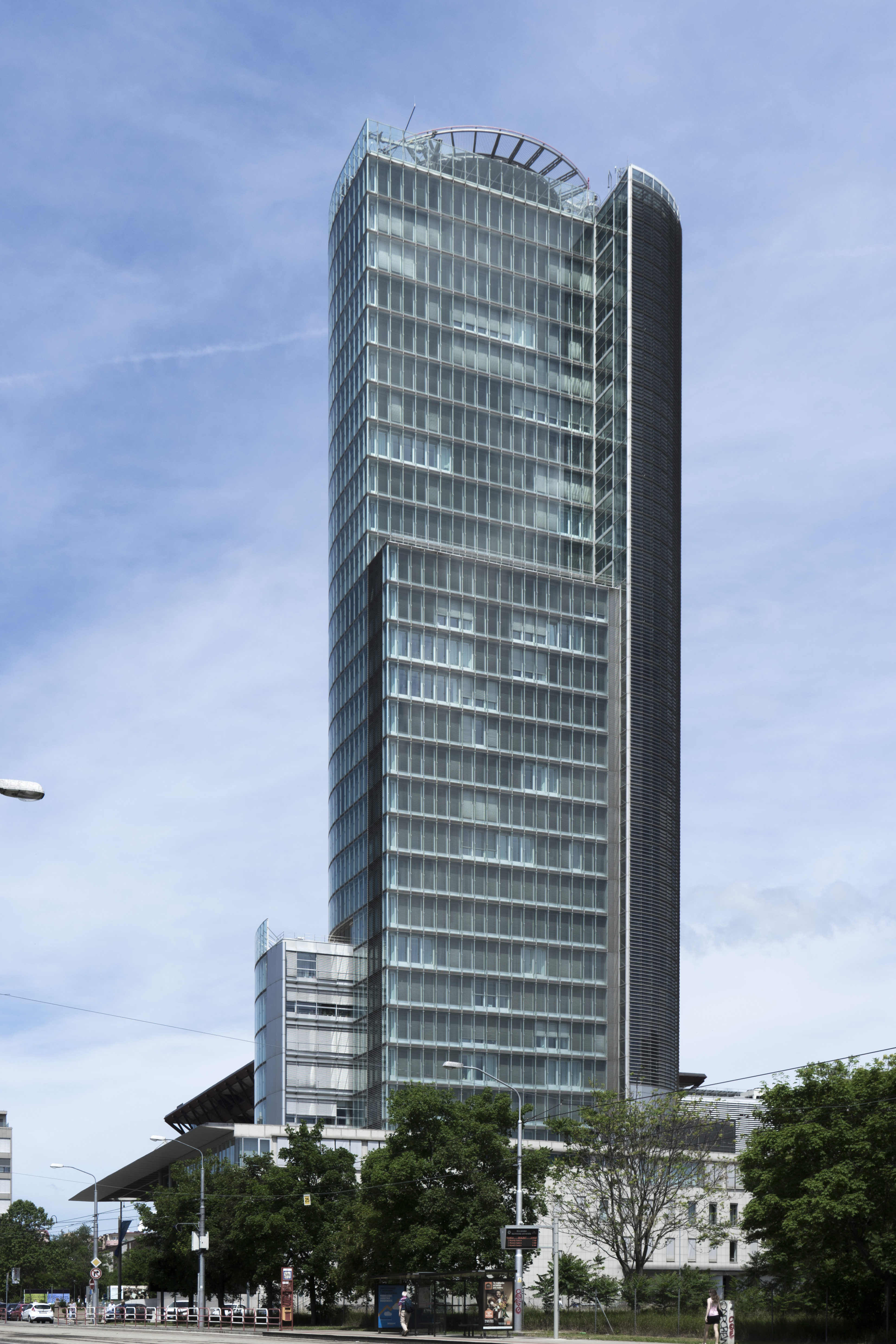 National Bank of Slovakia, Bratislava